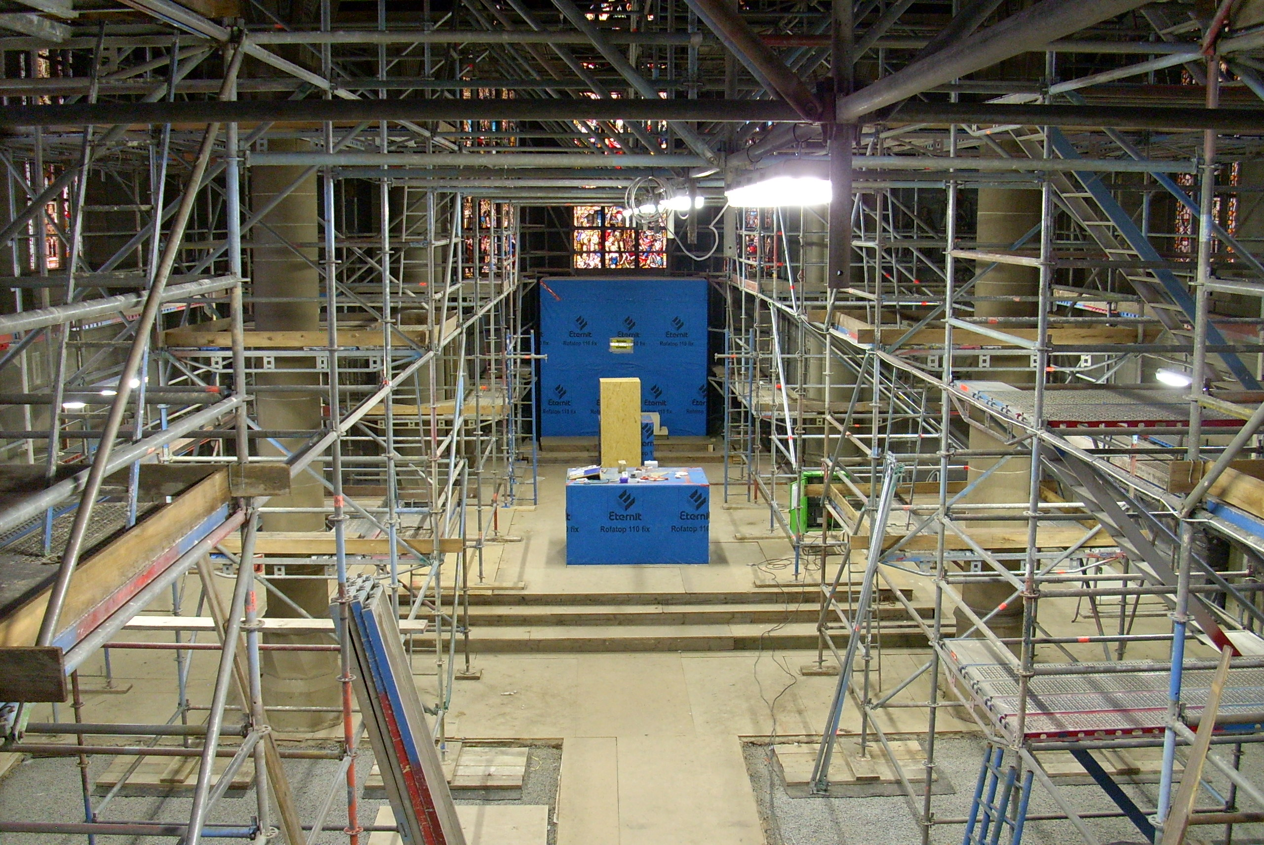 Gerüste während der Renovierung der katholischen Pfarrkirche St. Matthäus Bad Sobernheim